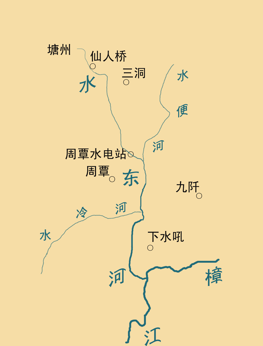 中国贵州省三都县境内水东河流域图。